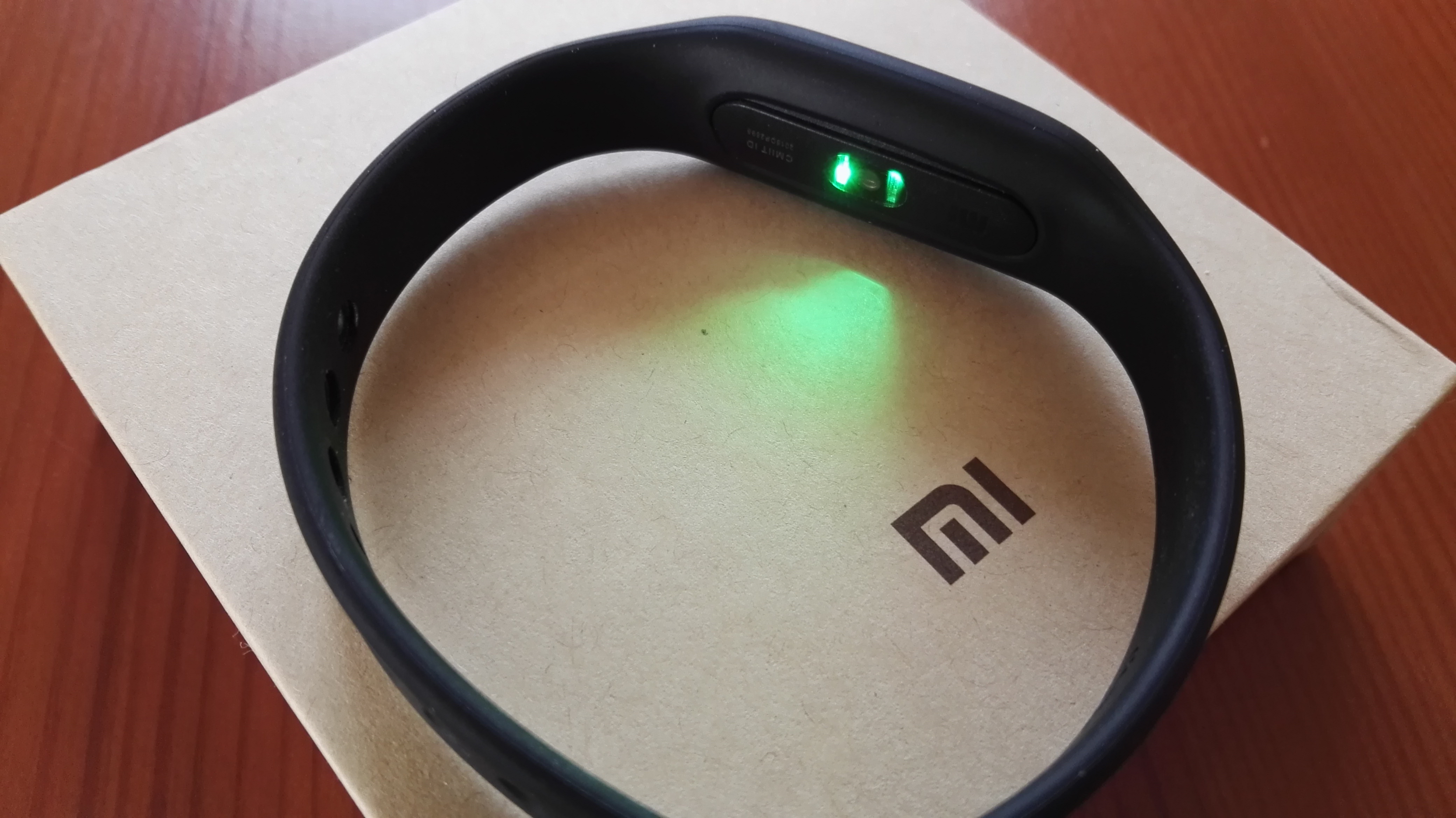 Sensor częstości pracy serca opaski Xiaomi Mi Band 1s podczas pracy.